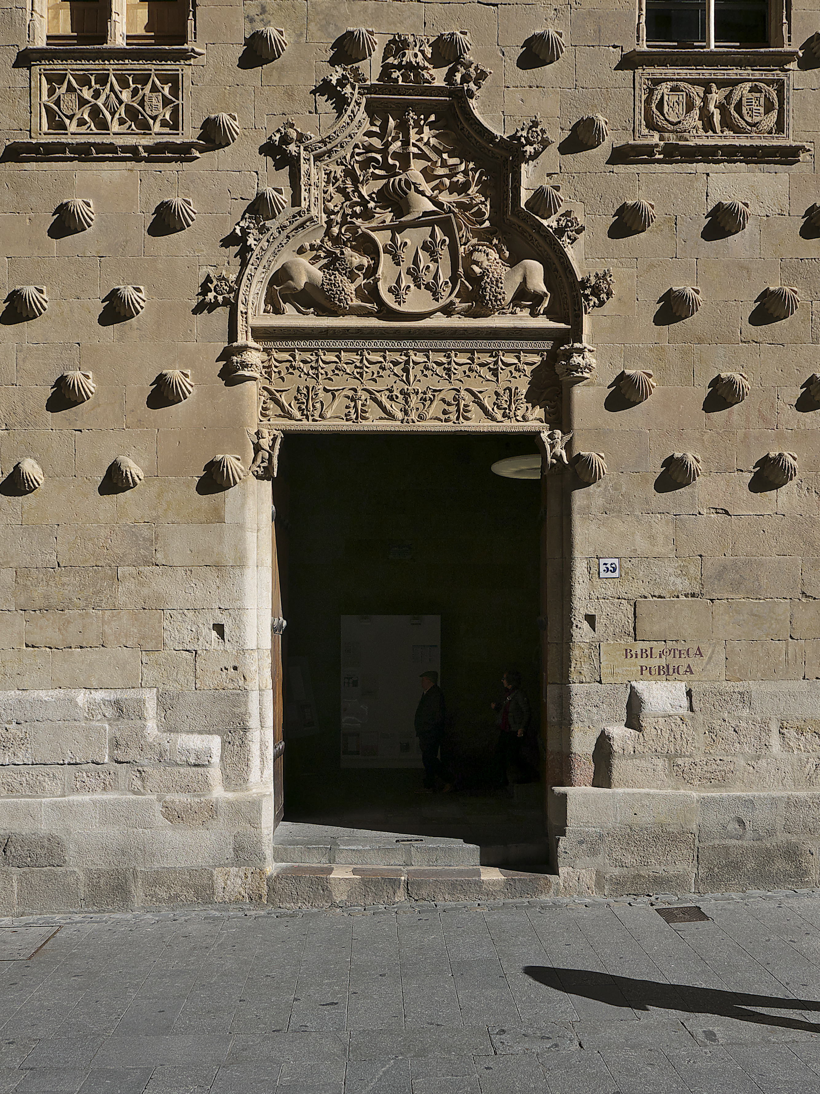 Entrada a la famosa casa-palacio.